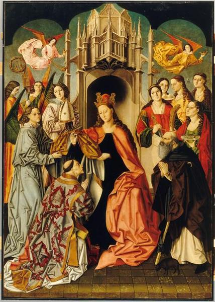 Imposición de la casulla a San Ildefonso, óleo sobre tabla, 230 x 167 cm, París, Museo del Louvre